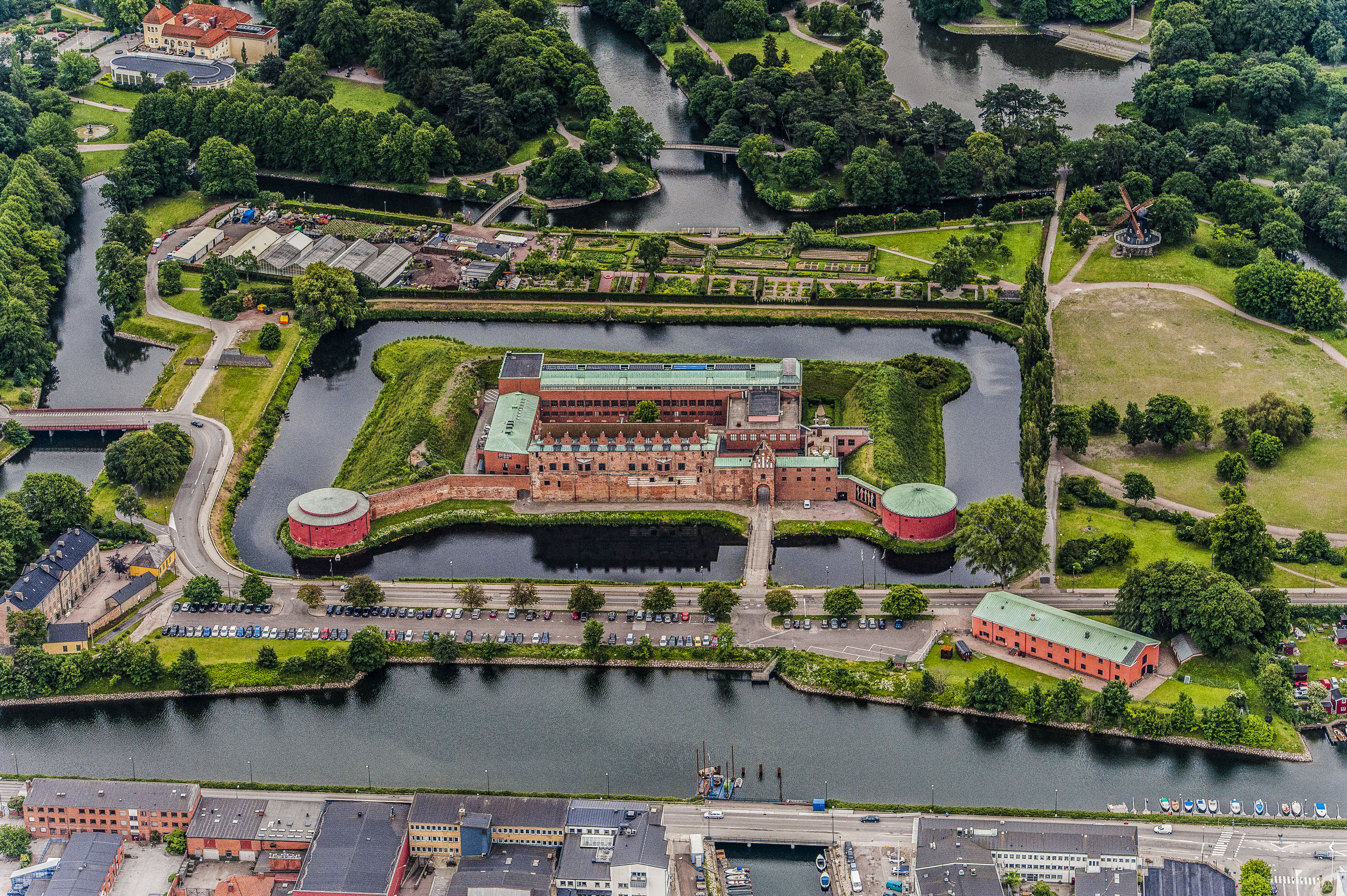 Malmöhus slott